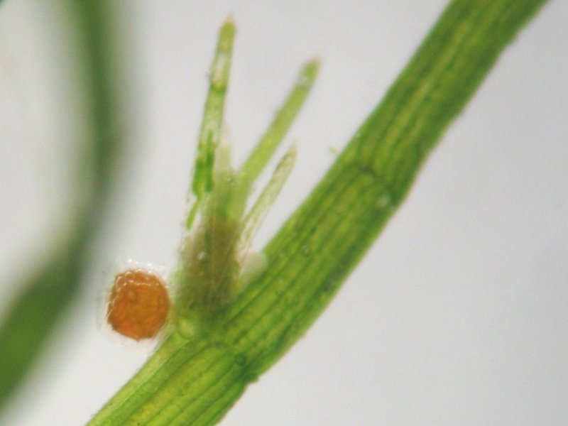 Feine Armleuchteralge Chara delicatula, Oogon, Müritz-Gebiet